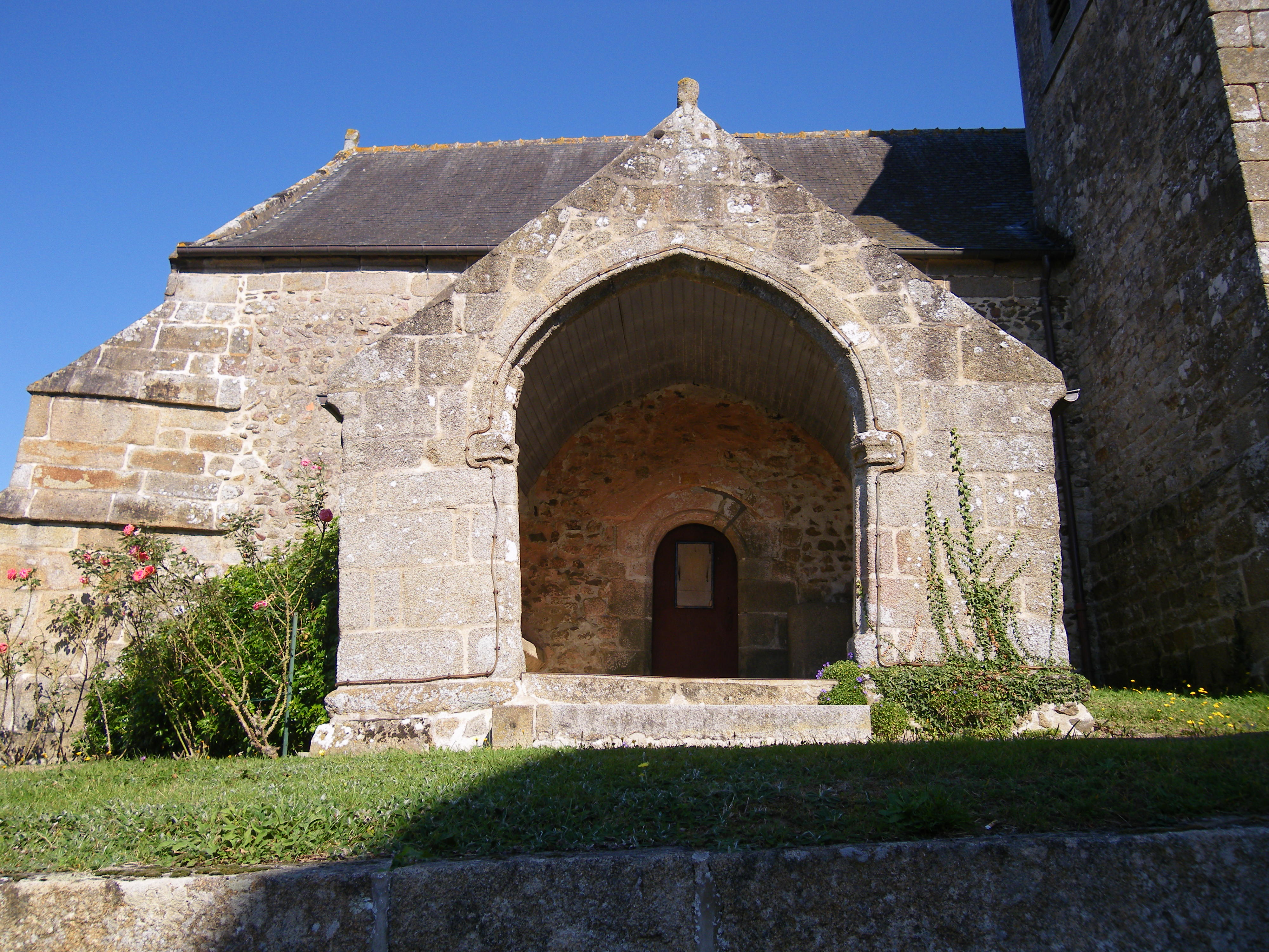 entrée laterale de l'eglise de romazy